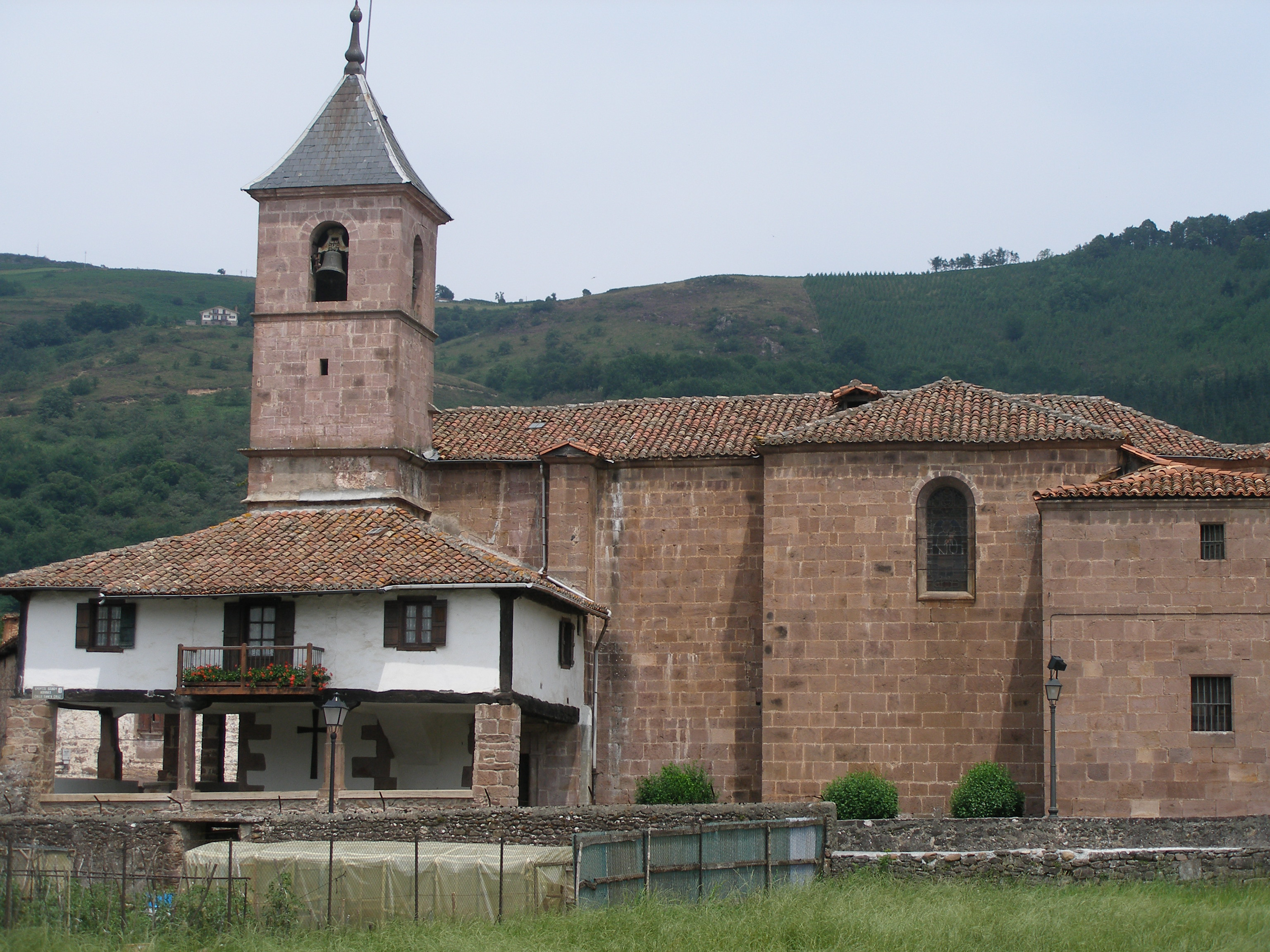 Elbete